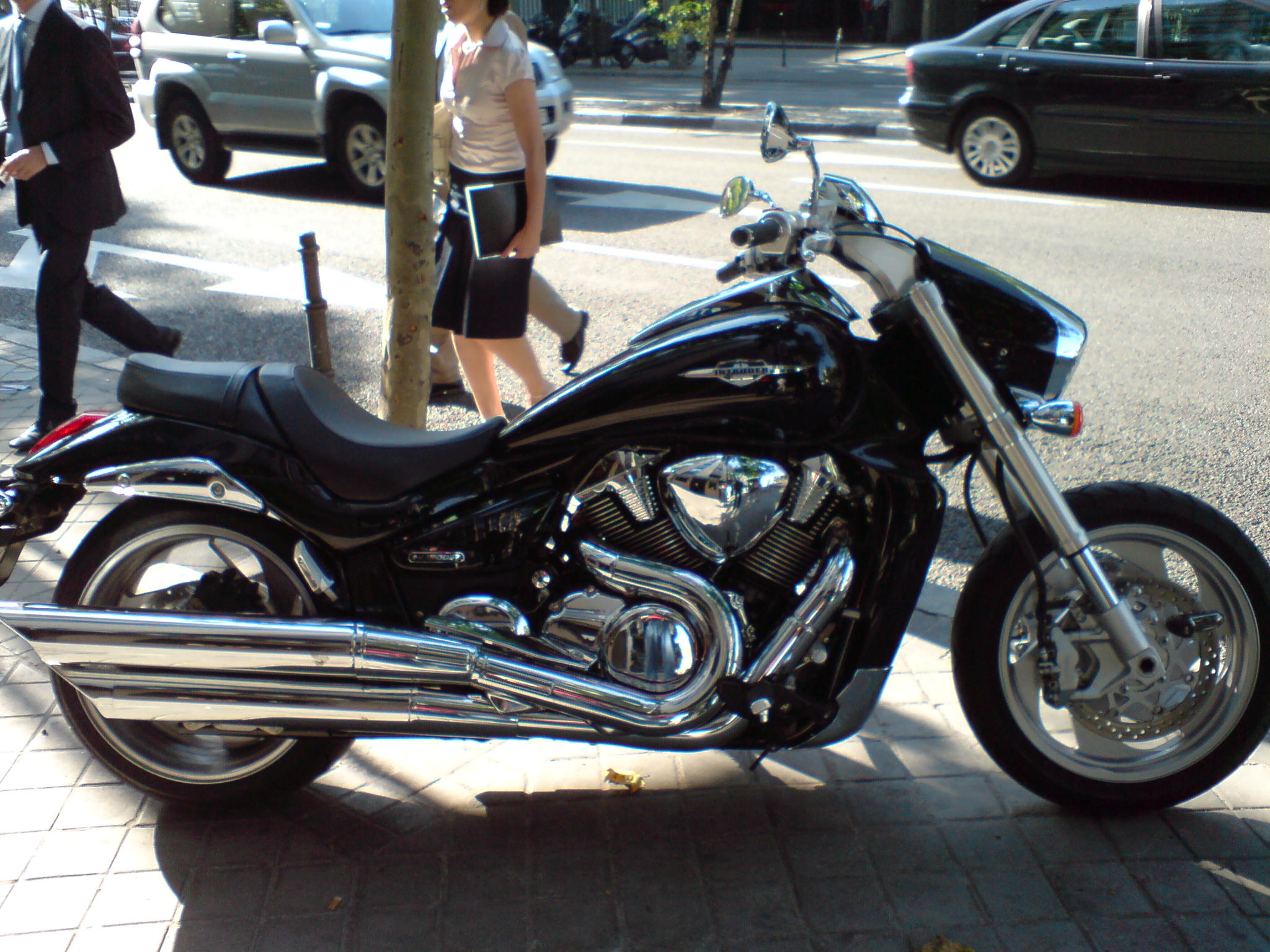 Suzuki Intruder M1800